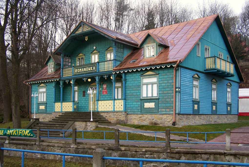 Krynica-Zdrój - Muzeum Nikifora (zabytek nr rejestr. A-405)